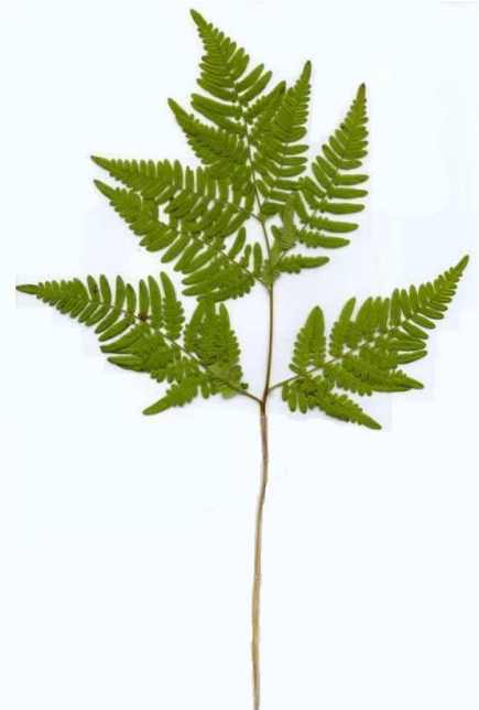 Pteridium aquilinum